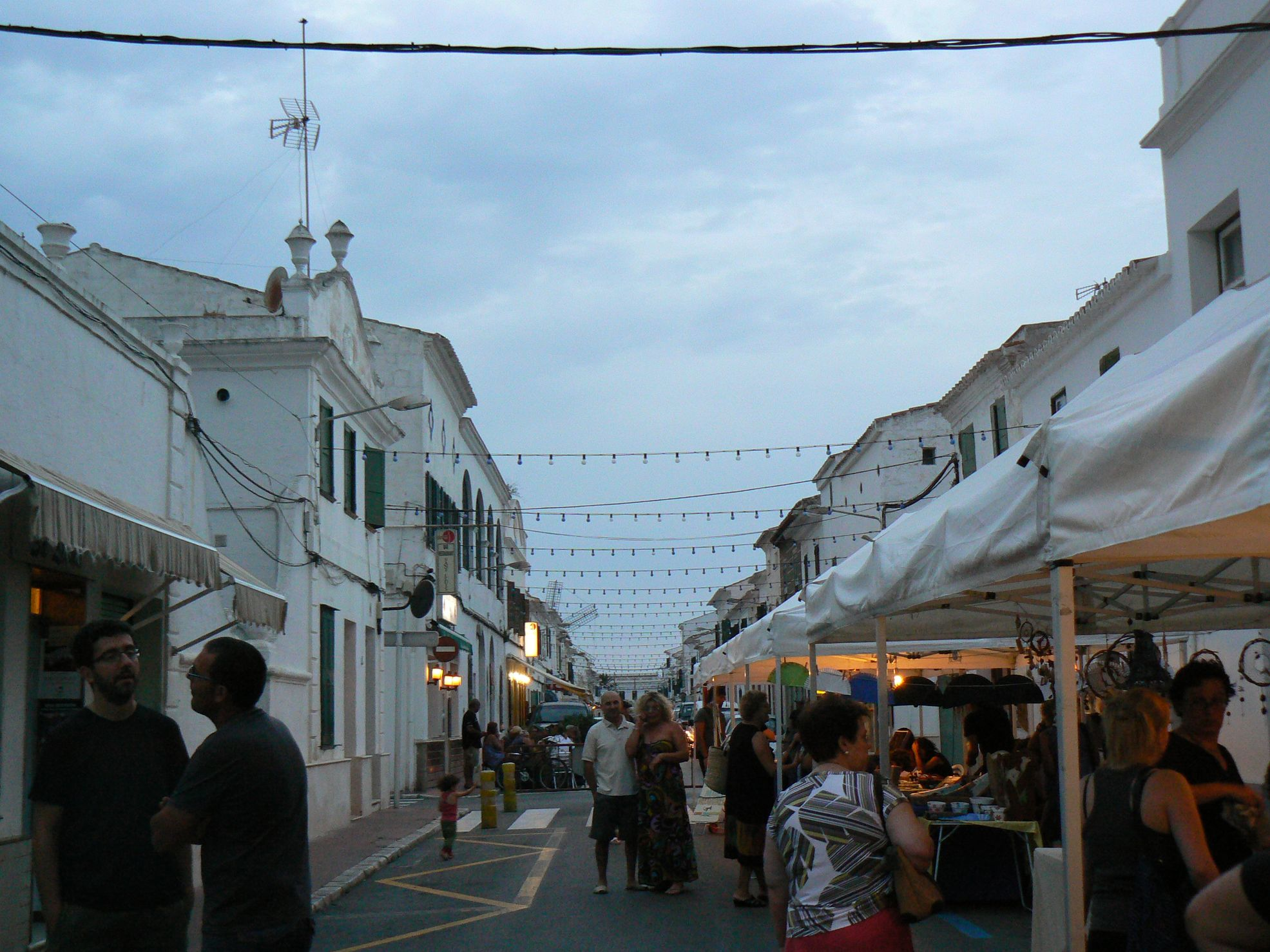 Paradetes als carrers de Sant Lluís (Menorca). El segon edifici a l'esquerra presenta un frontó típic de l'arquitectura francesa del segle XVIII.